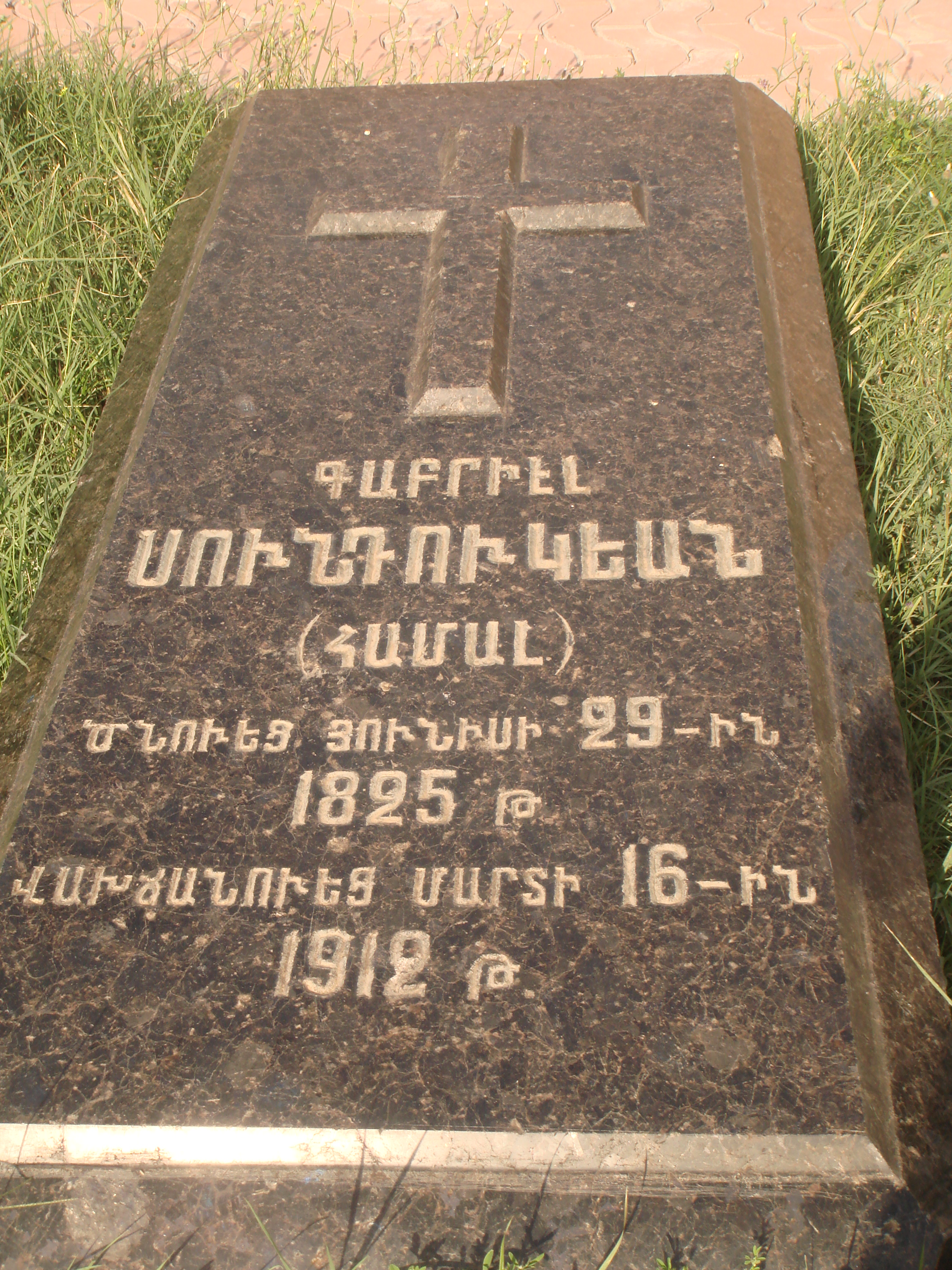 Խոջիվանքի պանթեոն